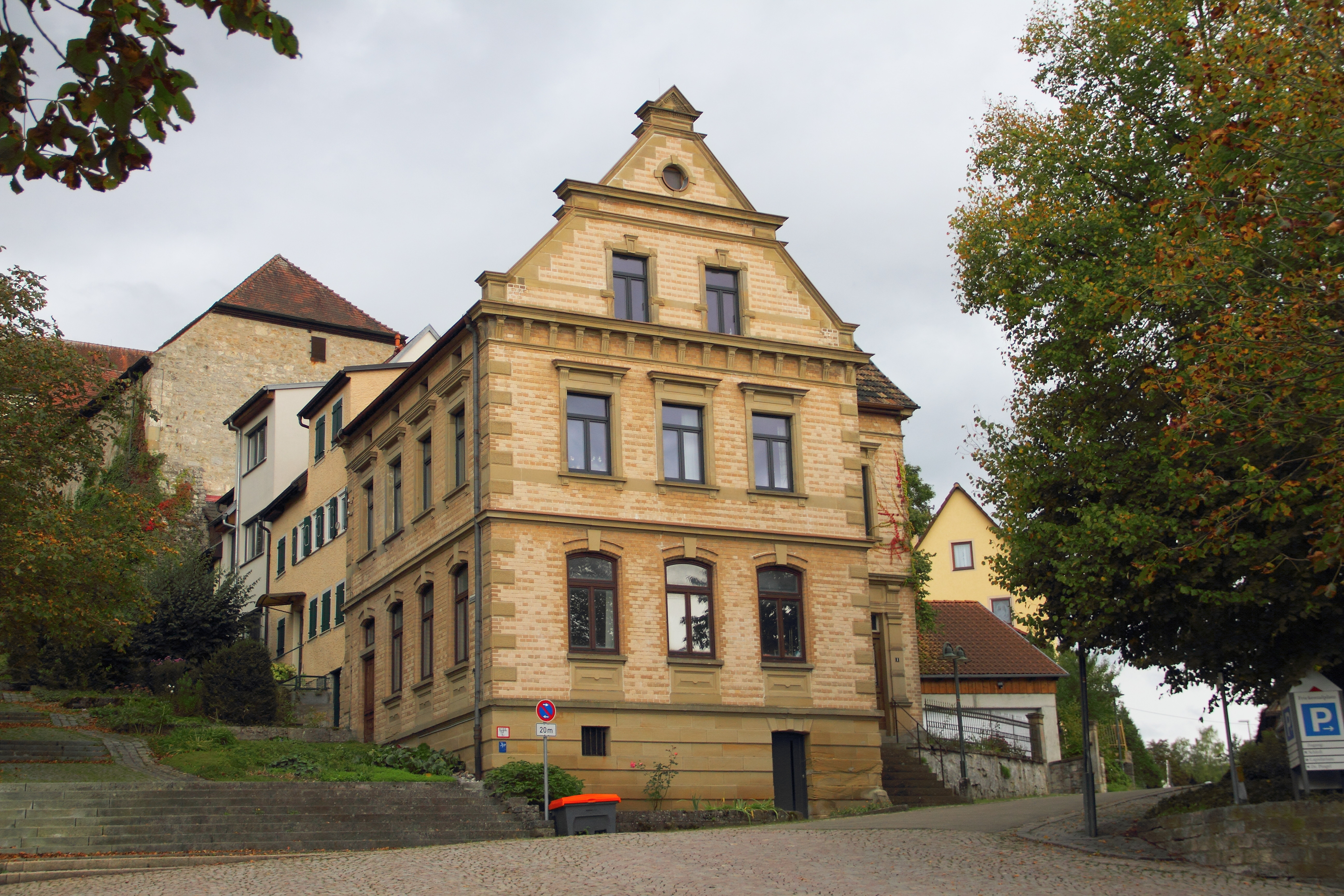 Die ehemalige denkmalgeschützte Schule in der Hollenbacher Straße 1.